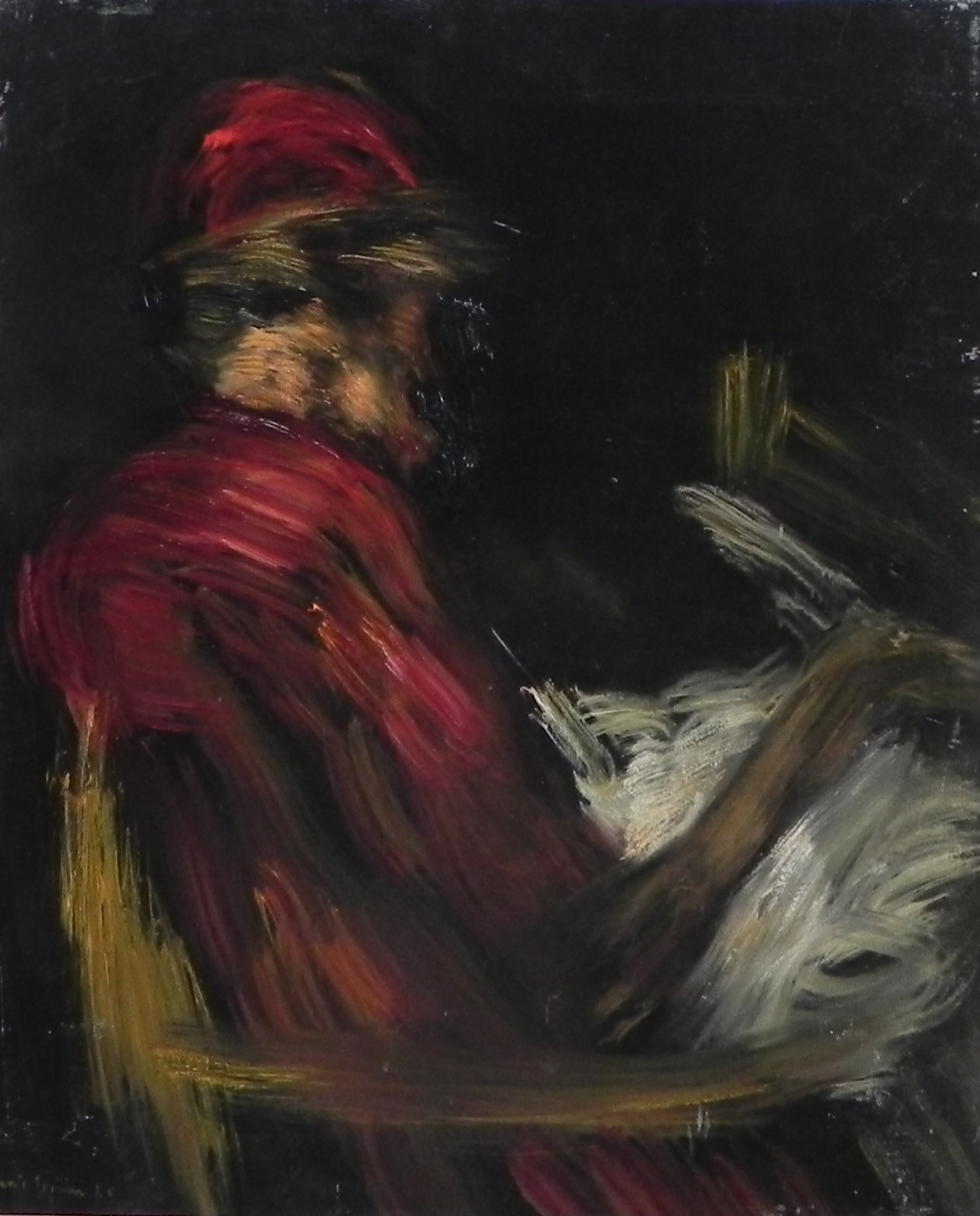 Sweet Emma Barrett 1980